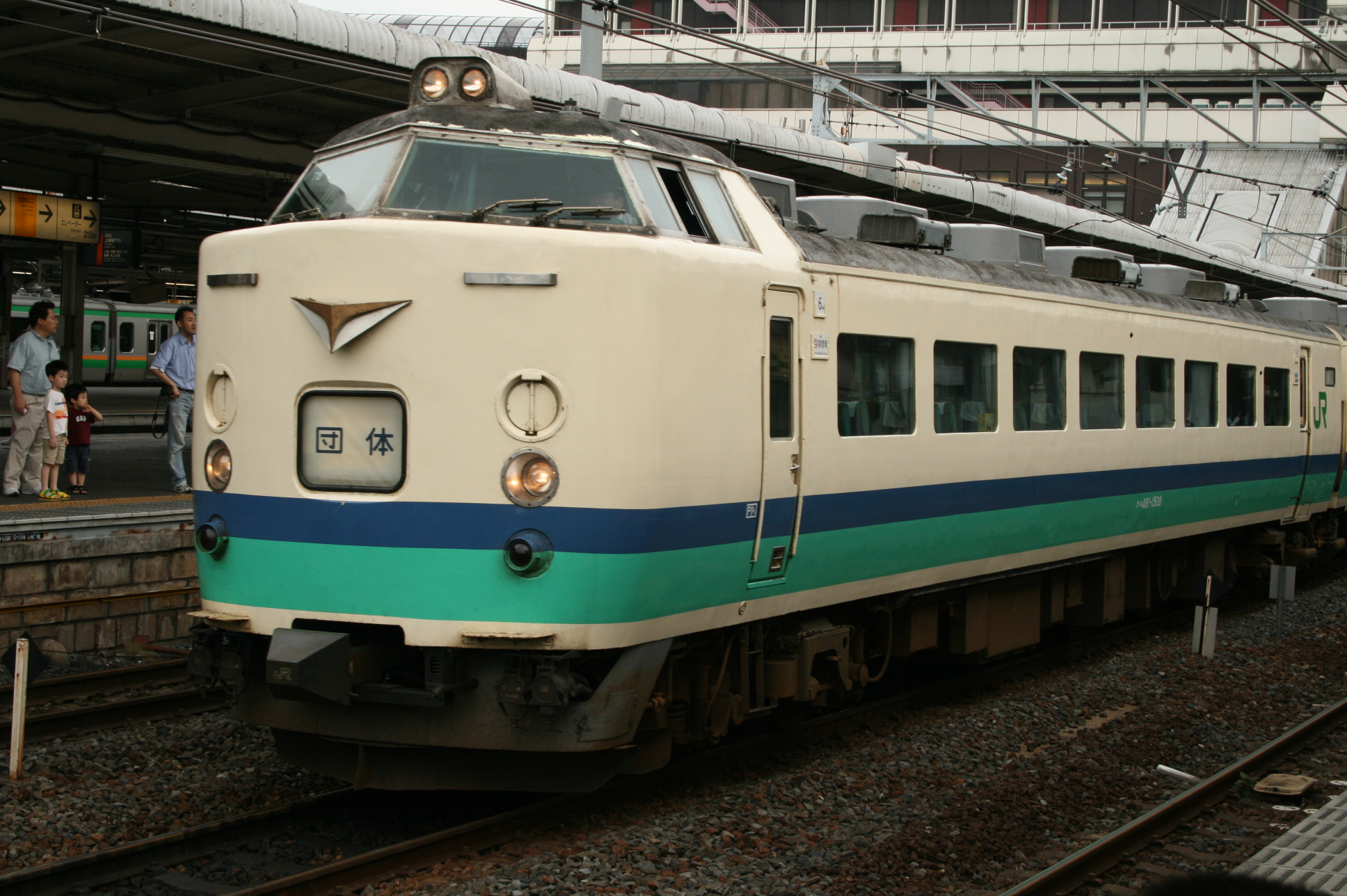 JNR 485 in Ōmiya Station